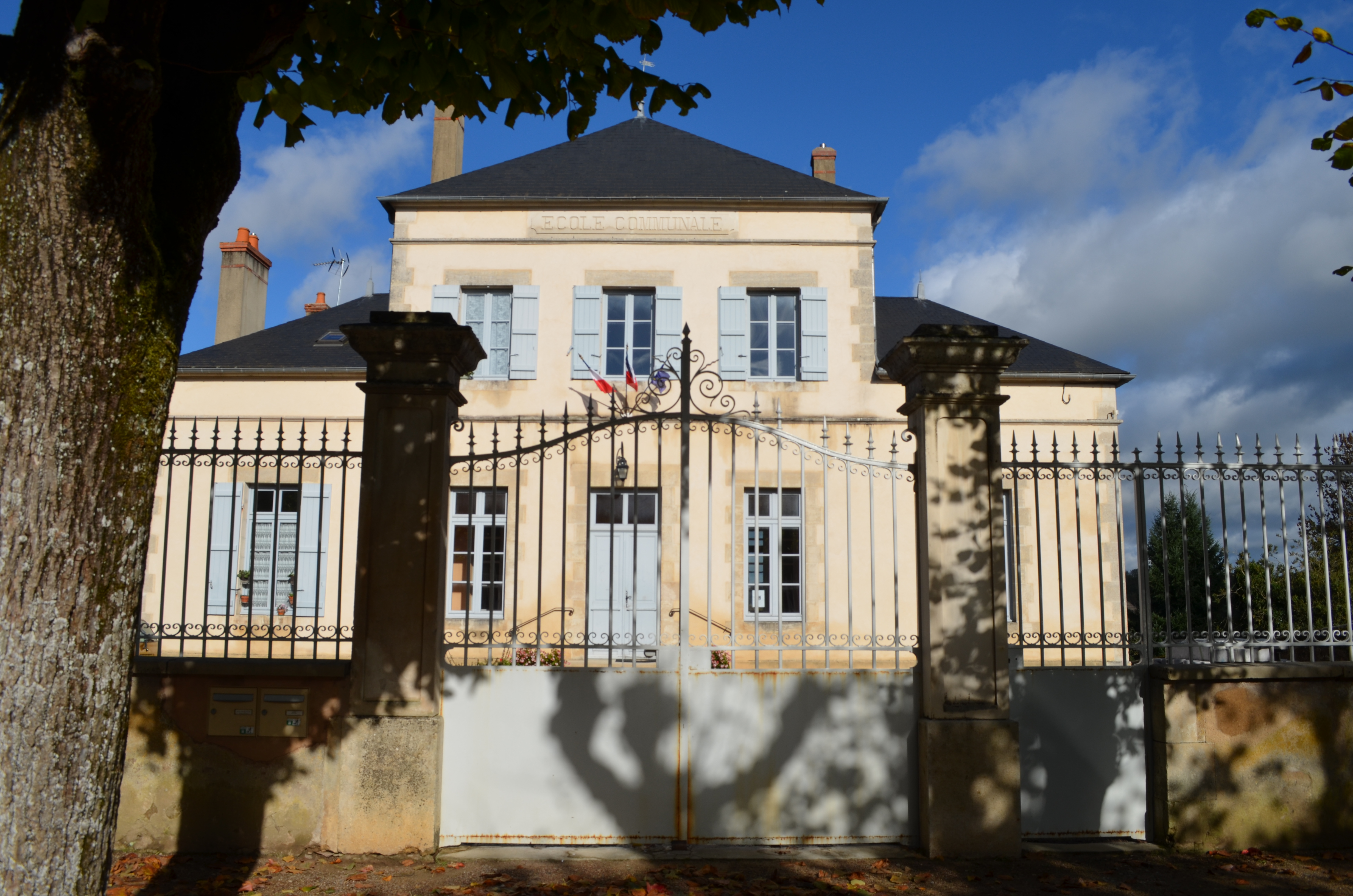 Mairie de Pontaubert.